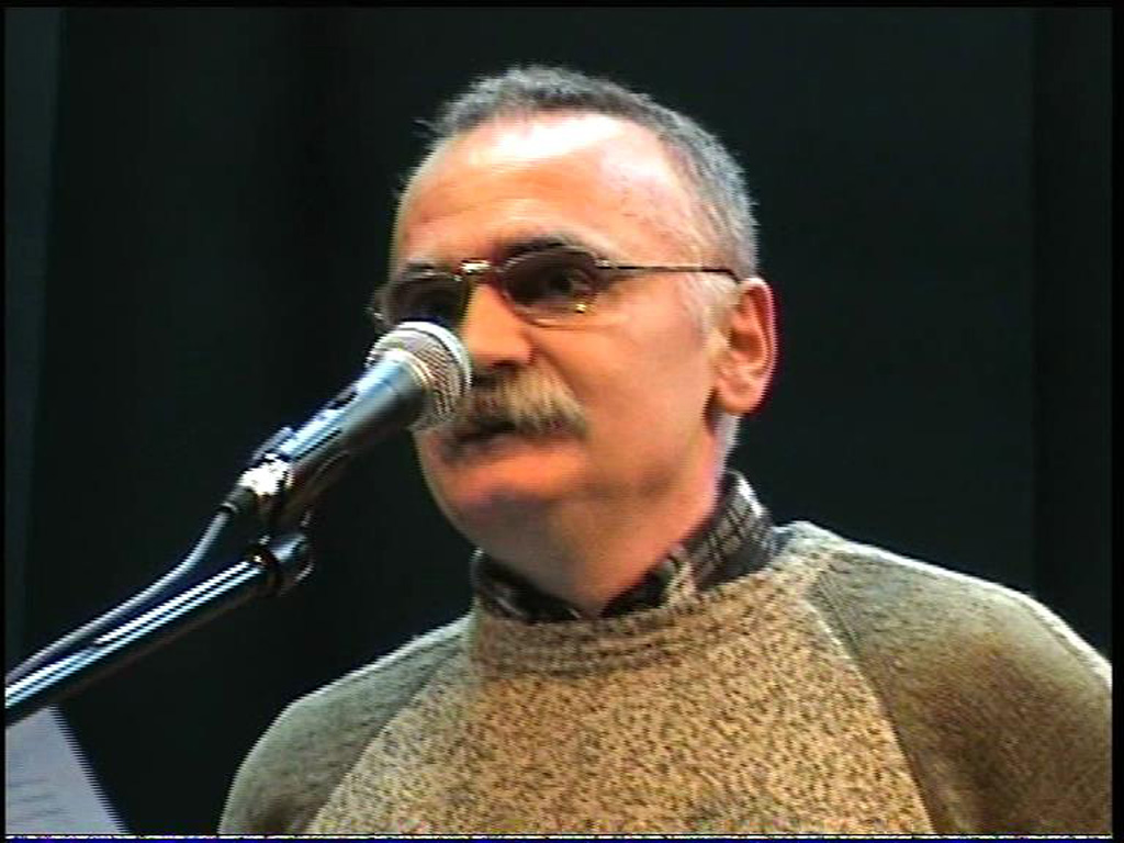 Srpski (latinica): Vasa Radovanović, književnik